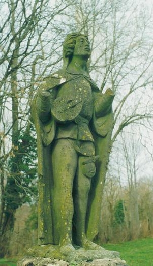 Statue de troubadour dans le parc du château de Clavières à Ayrens (15).